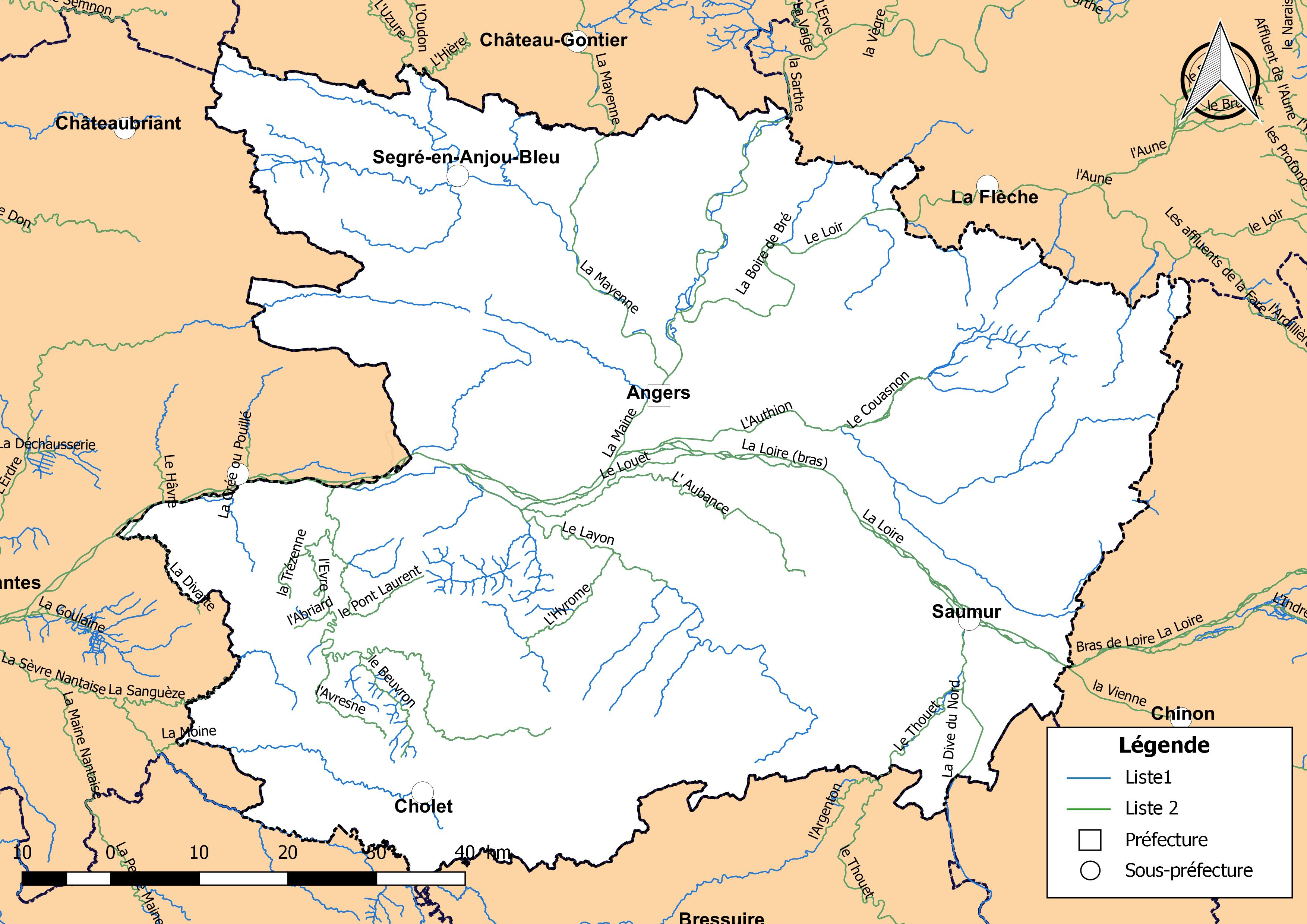 Classement des cours d'eau du département de Maine-et-Loire (France) au titre de la continuité écologique (article L214.17 I du Code de l'environnement).